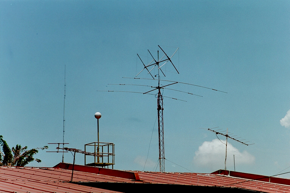 Antennas for Amateur Radio use in Kota Kinabalu, Sabah